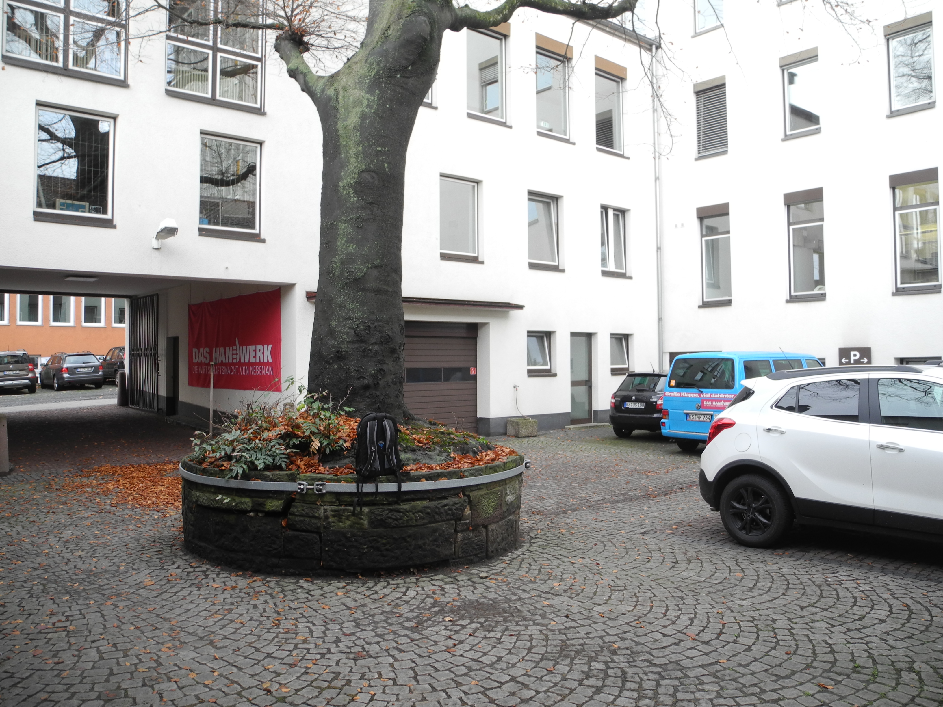 Naturdenkmal in Kassel 611.086. "1 Blutbuche" (Fagus sylvatica f. purpurea) - Scheidemannplatz, Ecke Treppenstraße, im Innenhof der Handwerkskammer.